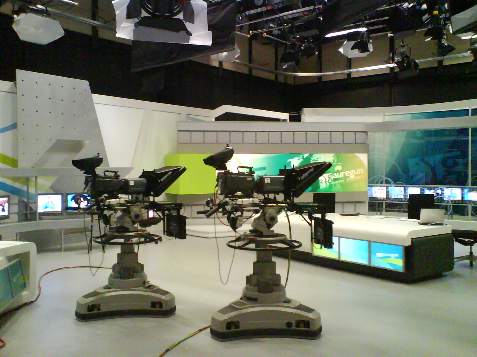 Plato del estudio 1 de la nueva sede de ETB en Bilbao (Vizcaya, País Vasco (España))